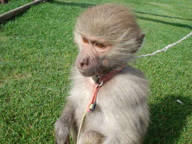 Dosya yükleyen kullanıcıya aittir. Bir evcil maymun fotoğrafı